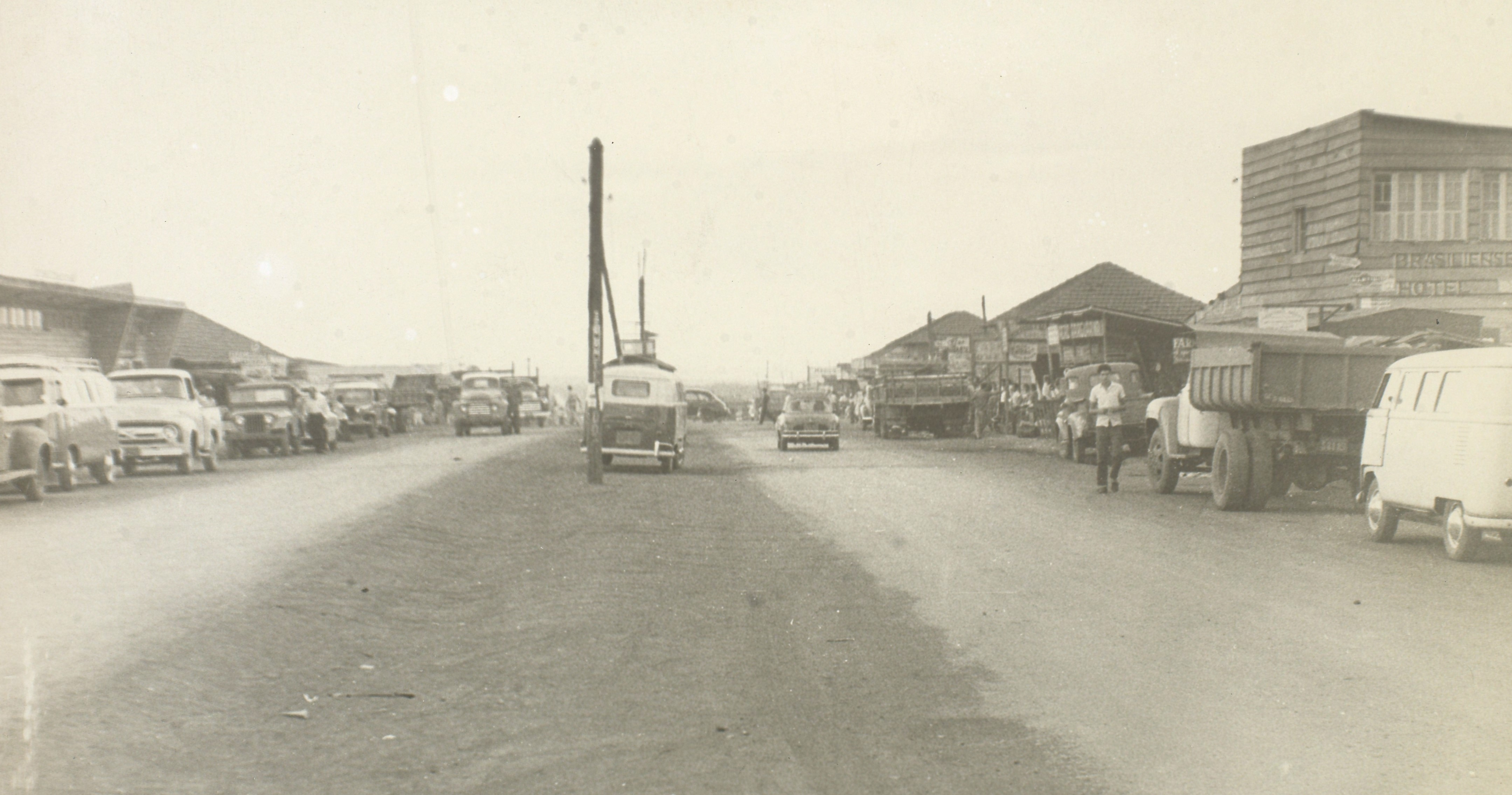 Fotografia do Fundo Correio da Manhã, sob a guarda do Arquivo Nacional.